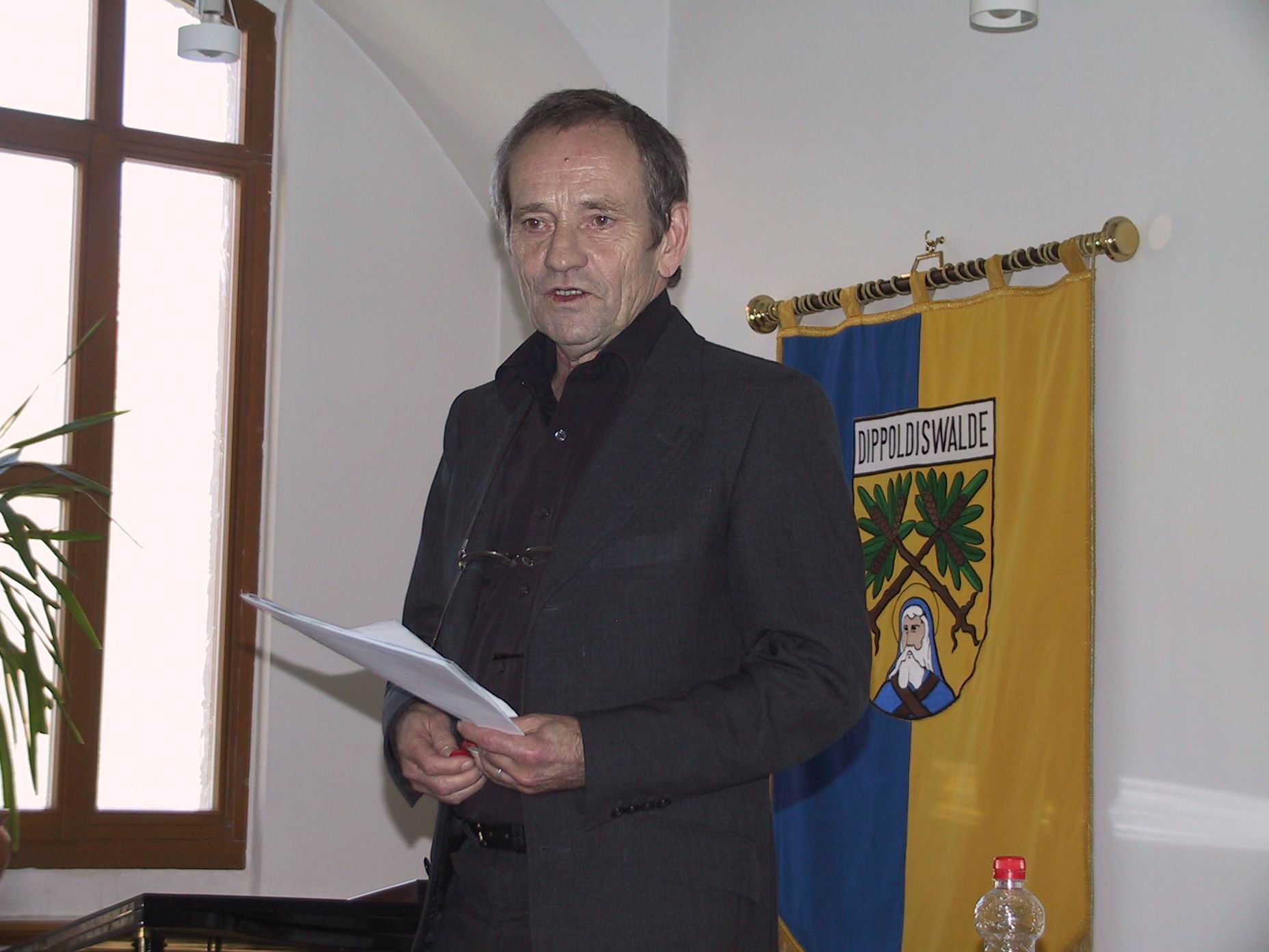 Peter Ensikat (Lesung in Dippoldiswalde am 29.04.2007)